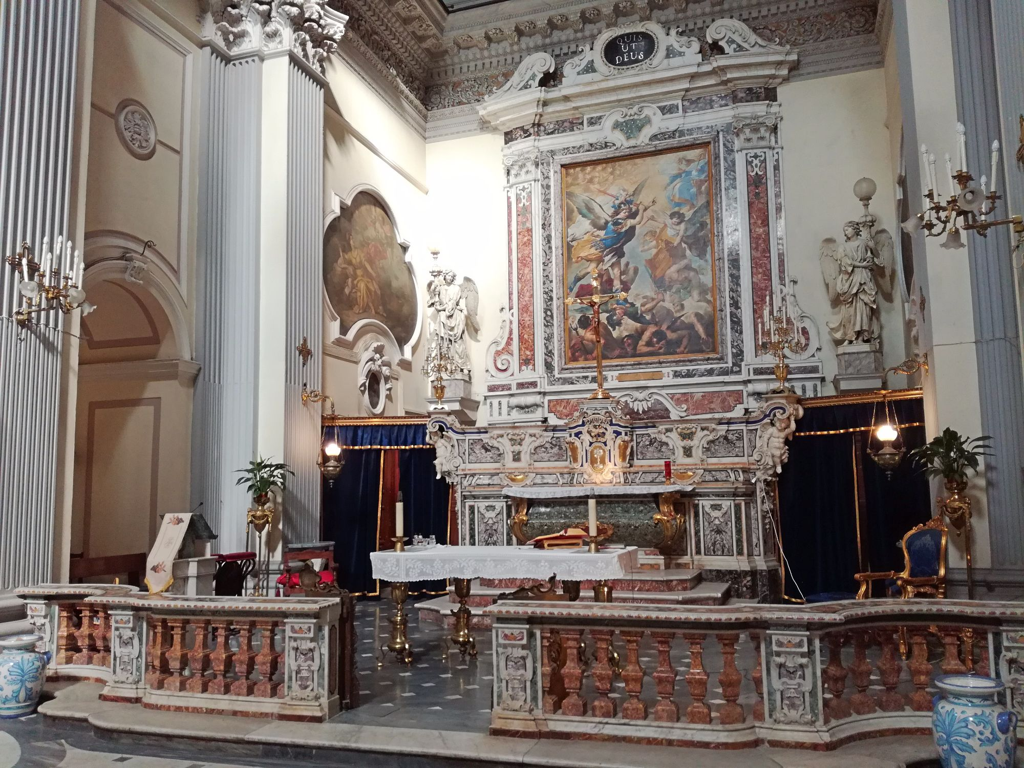 Altare Ascensione a Chiaia